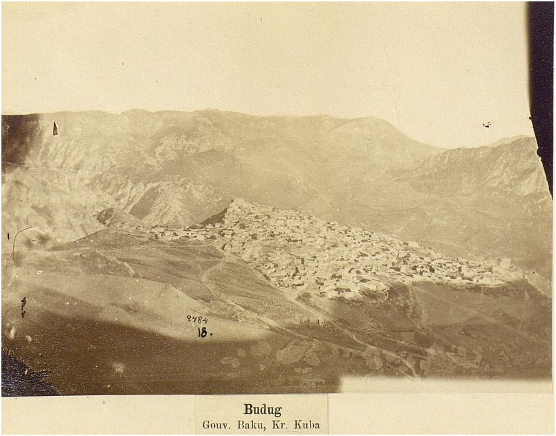 Buduq